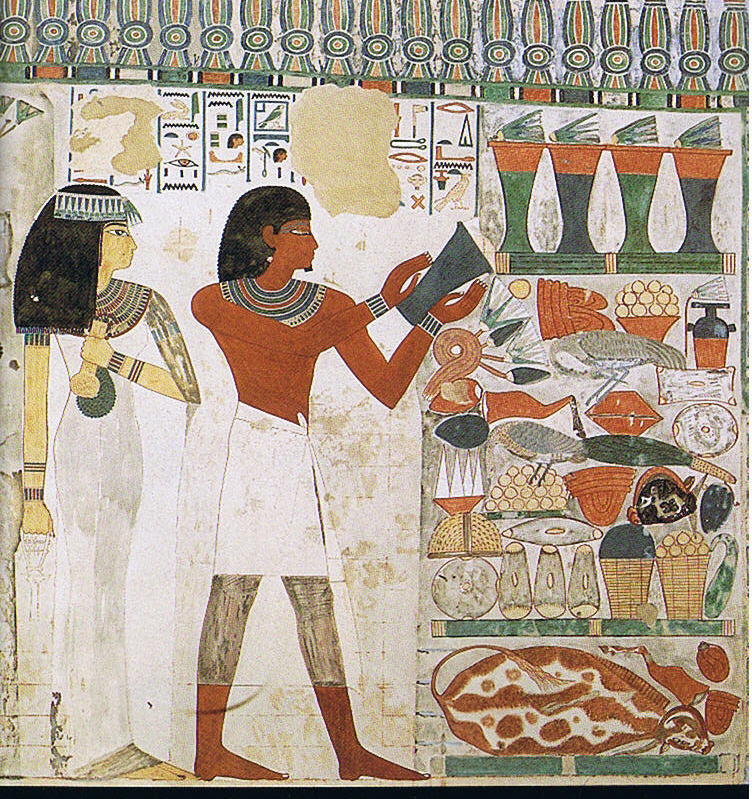 Nacht und Taui opfern